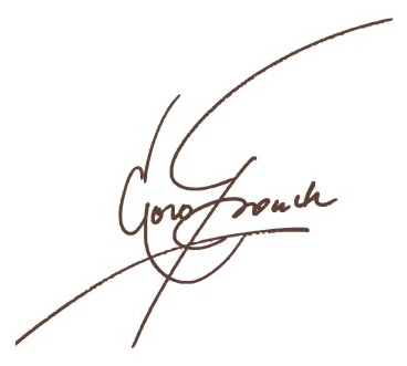 Unterschrift "Gero Trauth"